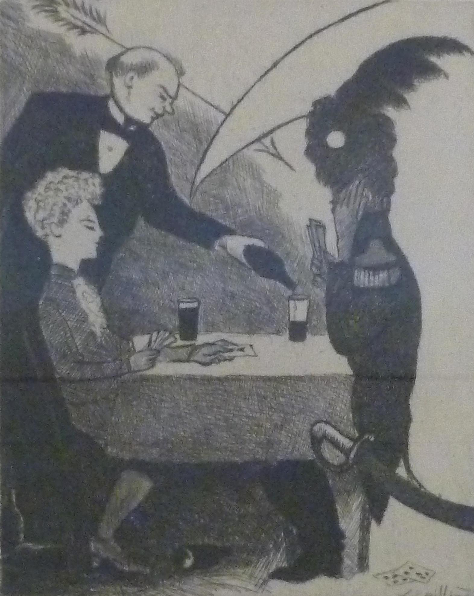 "Les flèches et la faux", illustratie (1935) door Léon Spilliaert voor de verhalenbuldel "Contes" van Horace Van Offel